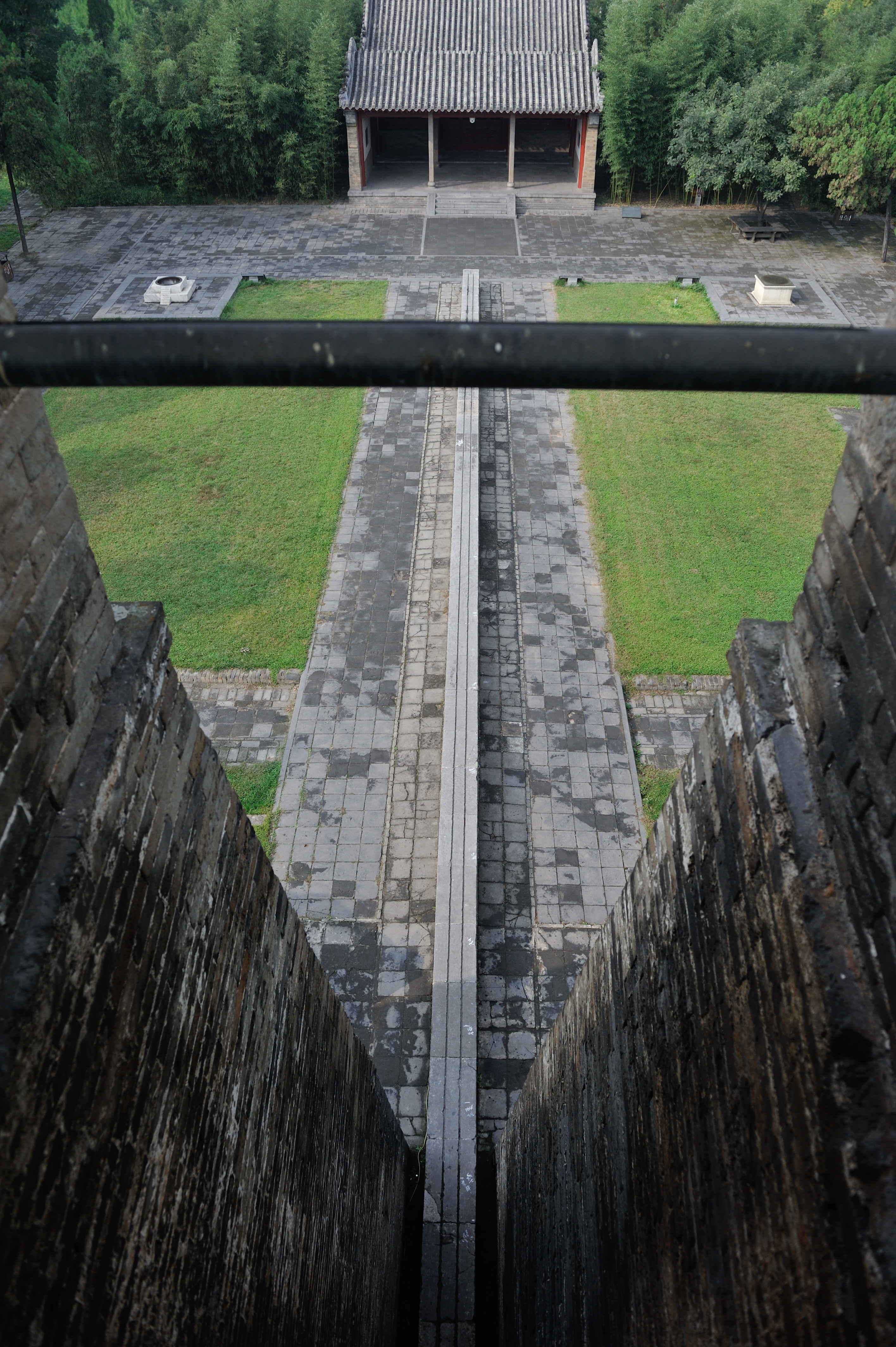 登封观星台